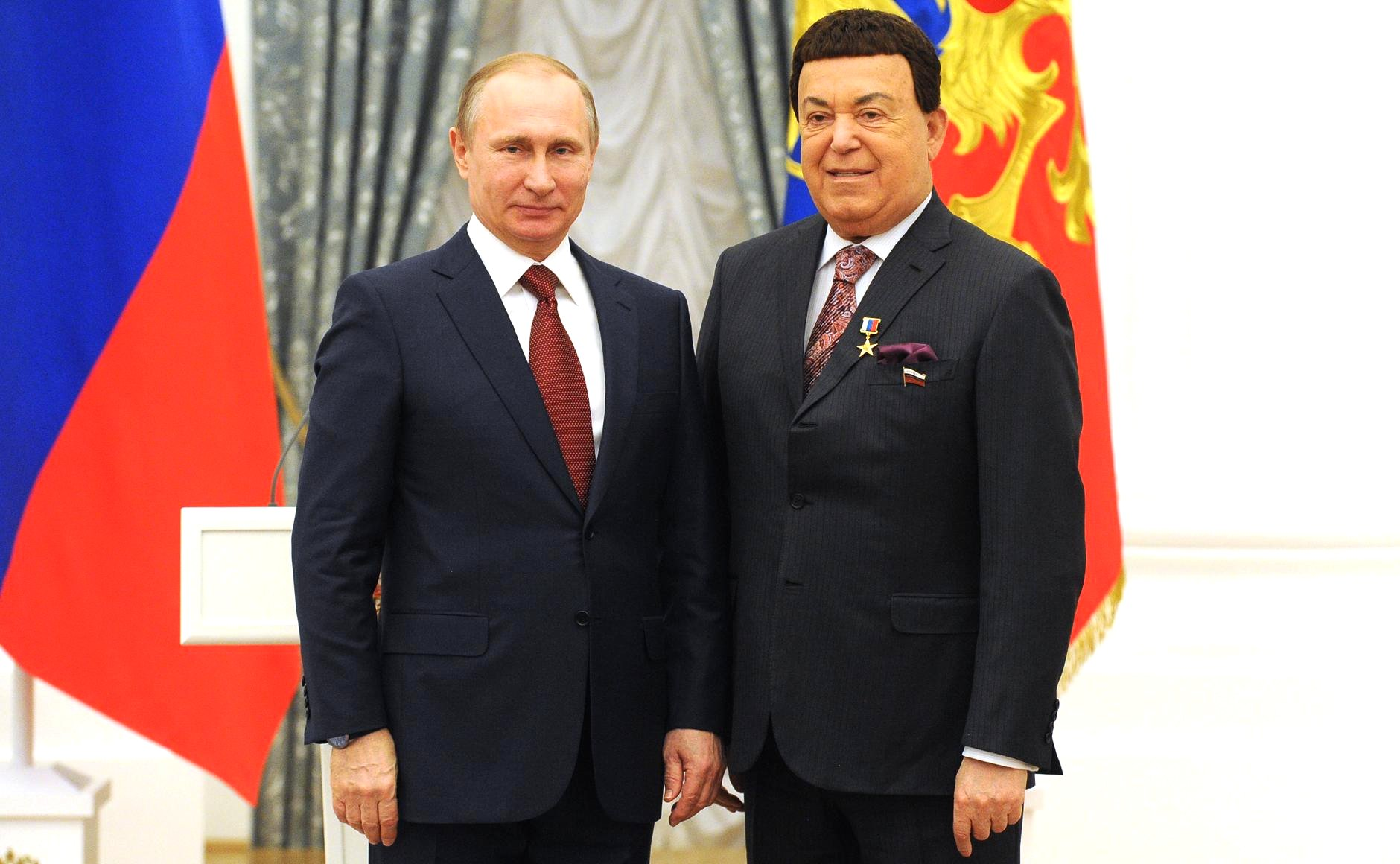 Вручение медалей «Герой Труда Российской Федерации». Владимир Путин и Иосиф Кобзон. Москва, Кремль, 30 апреля 2016 года.